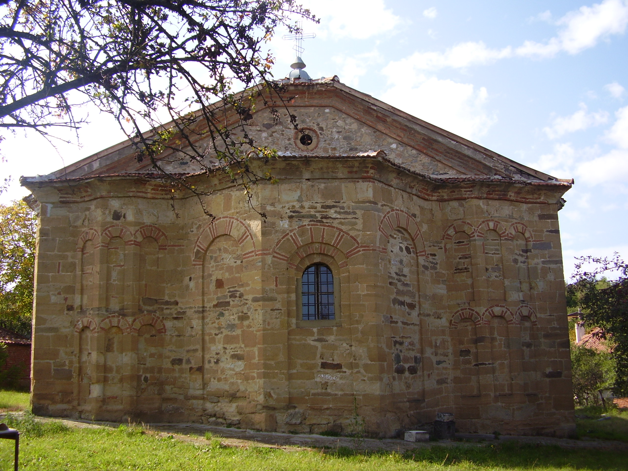 Църквата "Свети Илия" - общ изглед